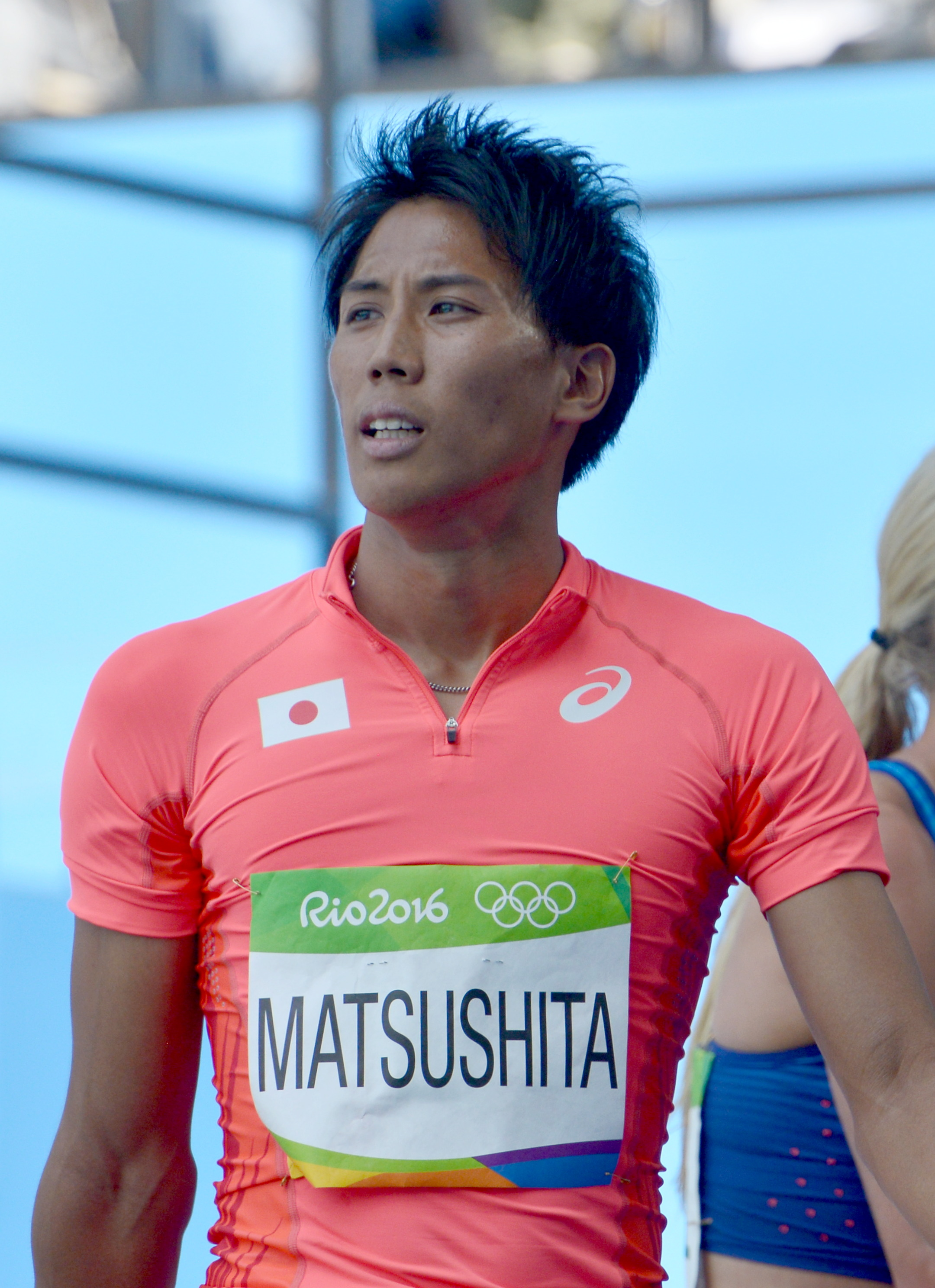 Quelques séries du 400m haies des jo de Rio 2016